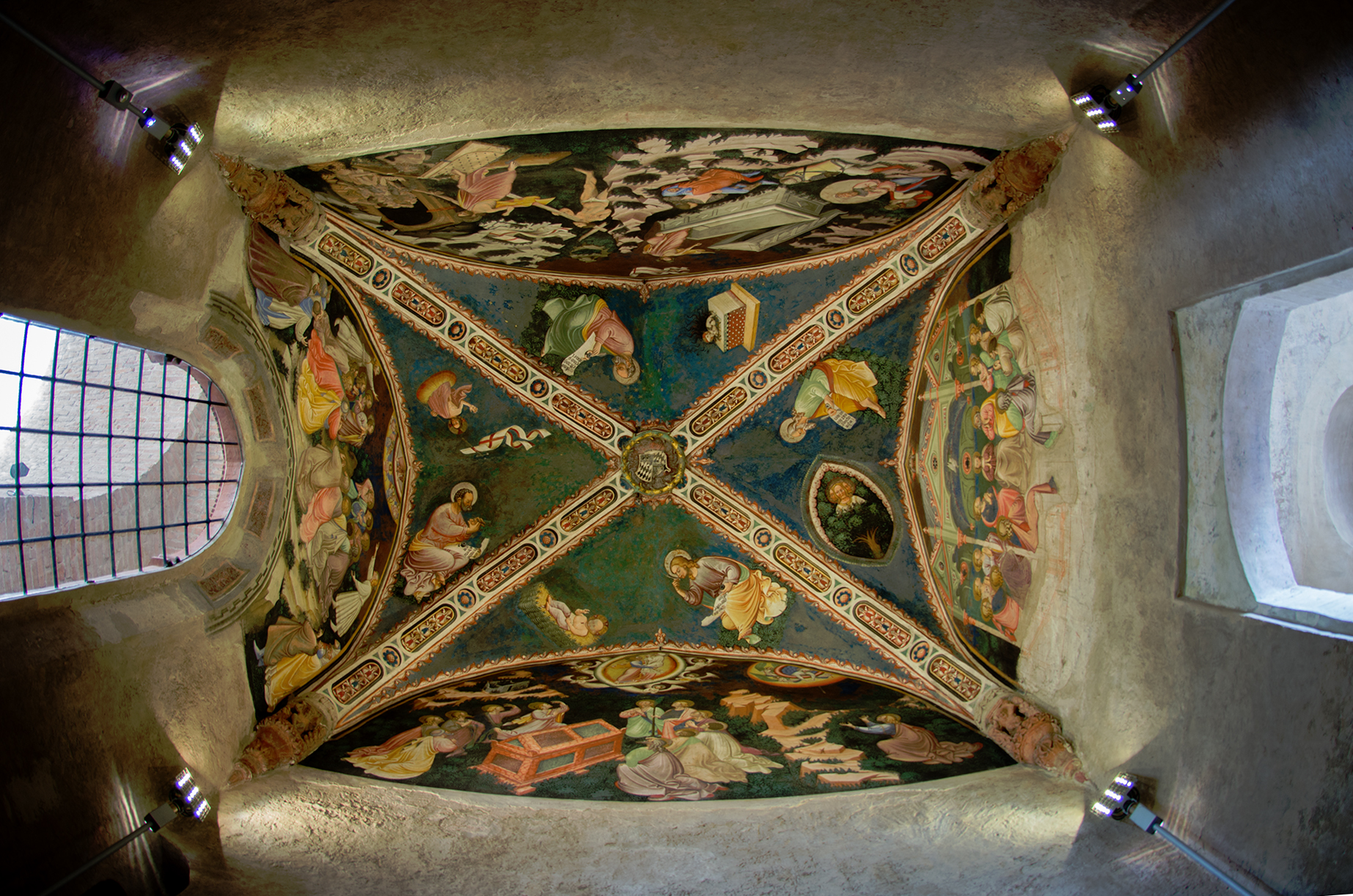 Maestro di Vignola, cappella Contrari, Rocca di Vignola This is a photo of a monument which is part of cultural heritage of Italy.